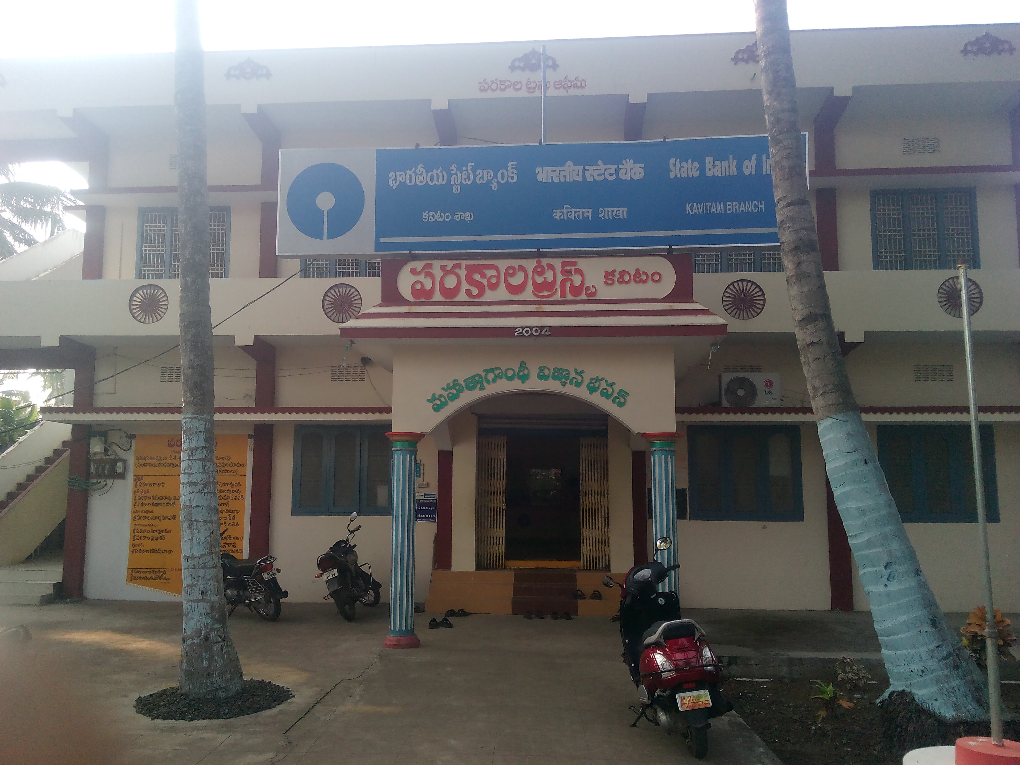 Parakala Trust -A.P. Village of Kavitam